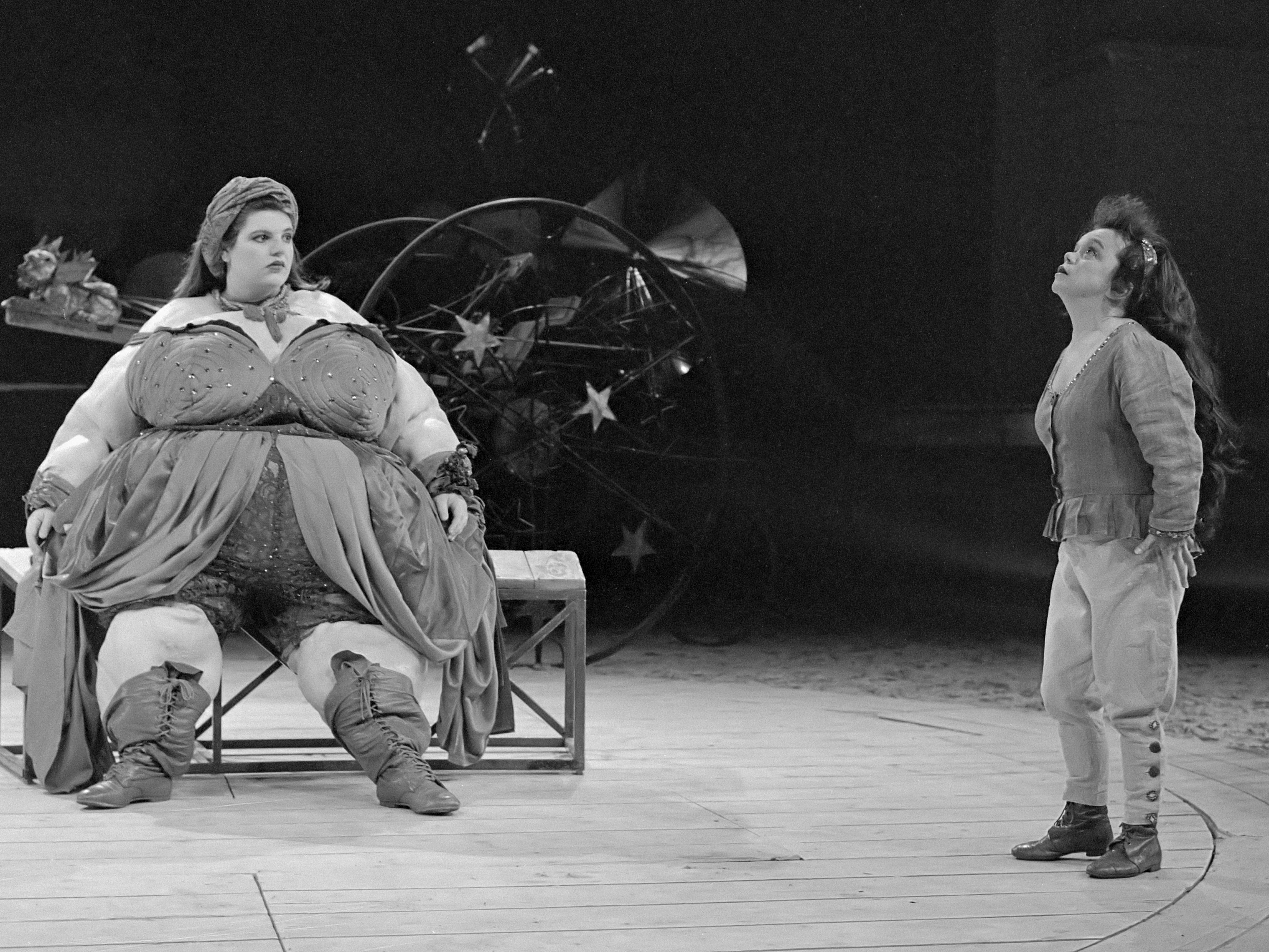 "Freaks" in Carré in Amsterdam. Scene met Frieda (Mireille Mosse) en Greece (Virginie Lavallée) 11 mei 1989